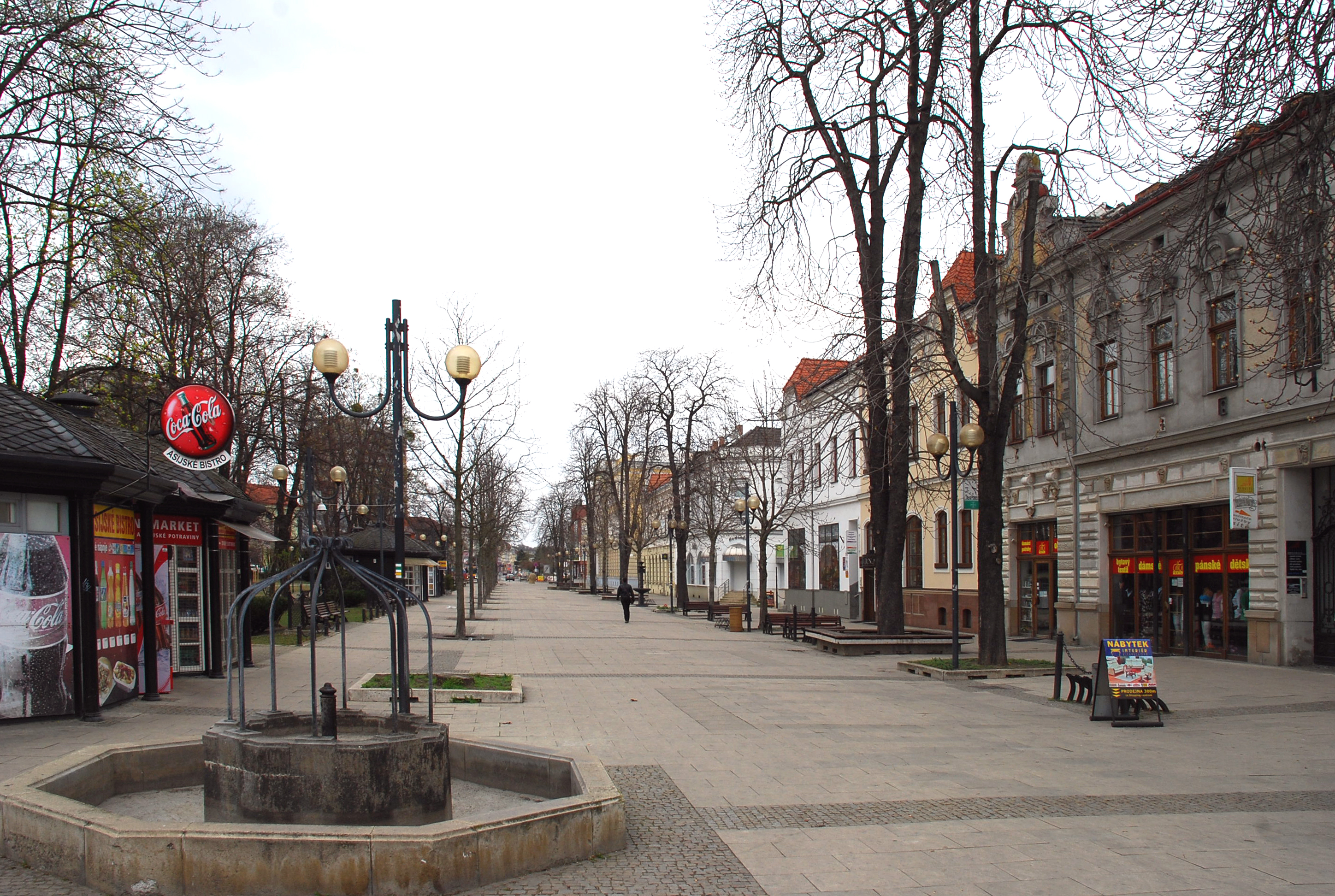 Ortsbild Břeclav, Tschechien